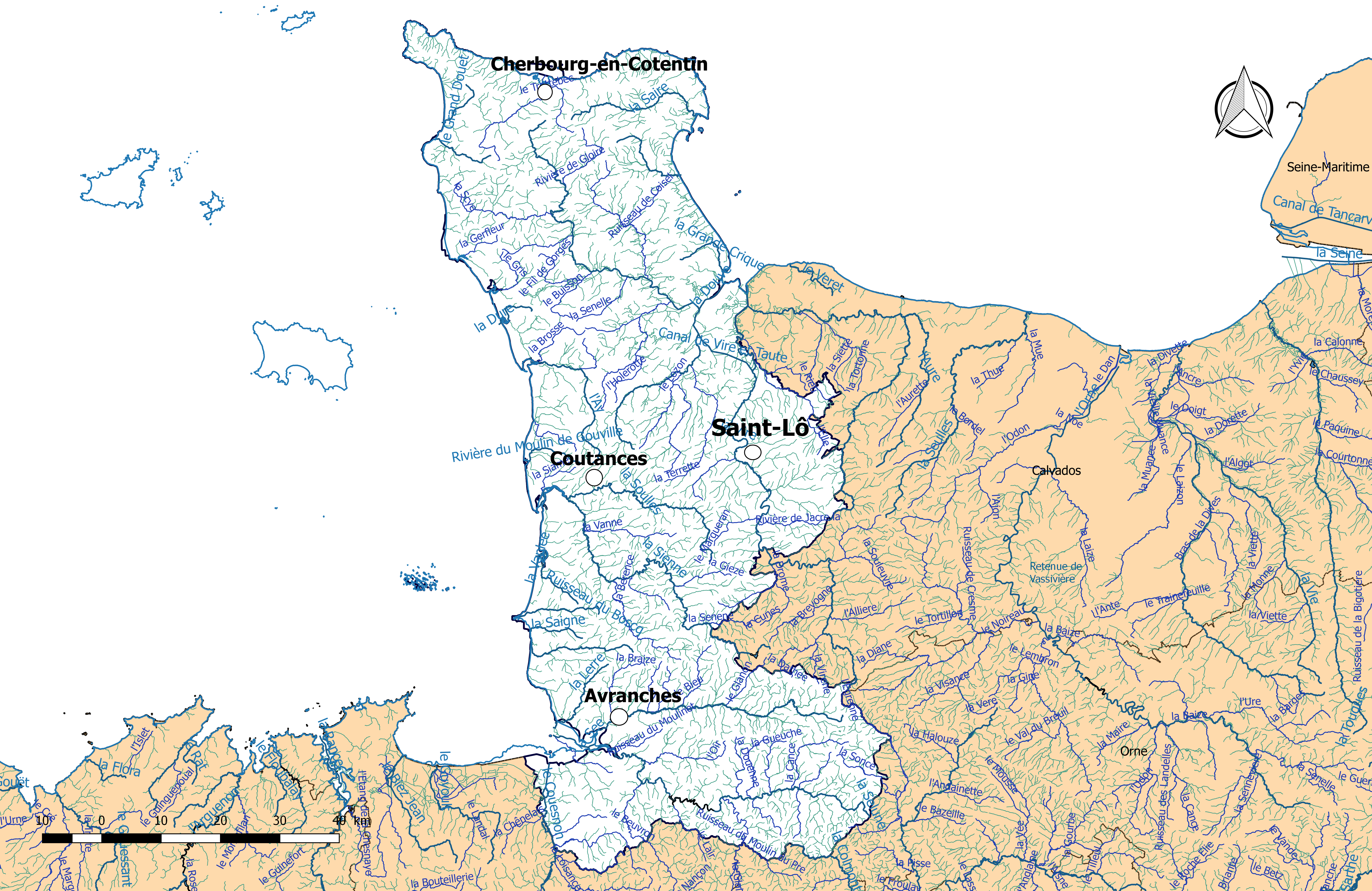 Carte du réseau hydrographique du département de la Manche (France).